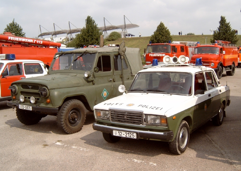 Polizeifahrzeuge aus russischer Produktion der Bereitschaftspolizei (links UAZ 469) und der Volkspolizei (rechts Lada 2107).